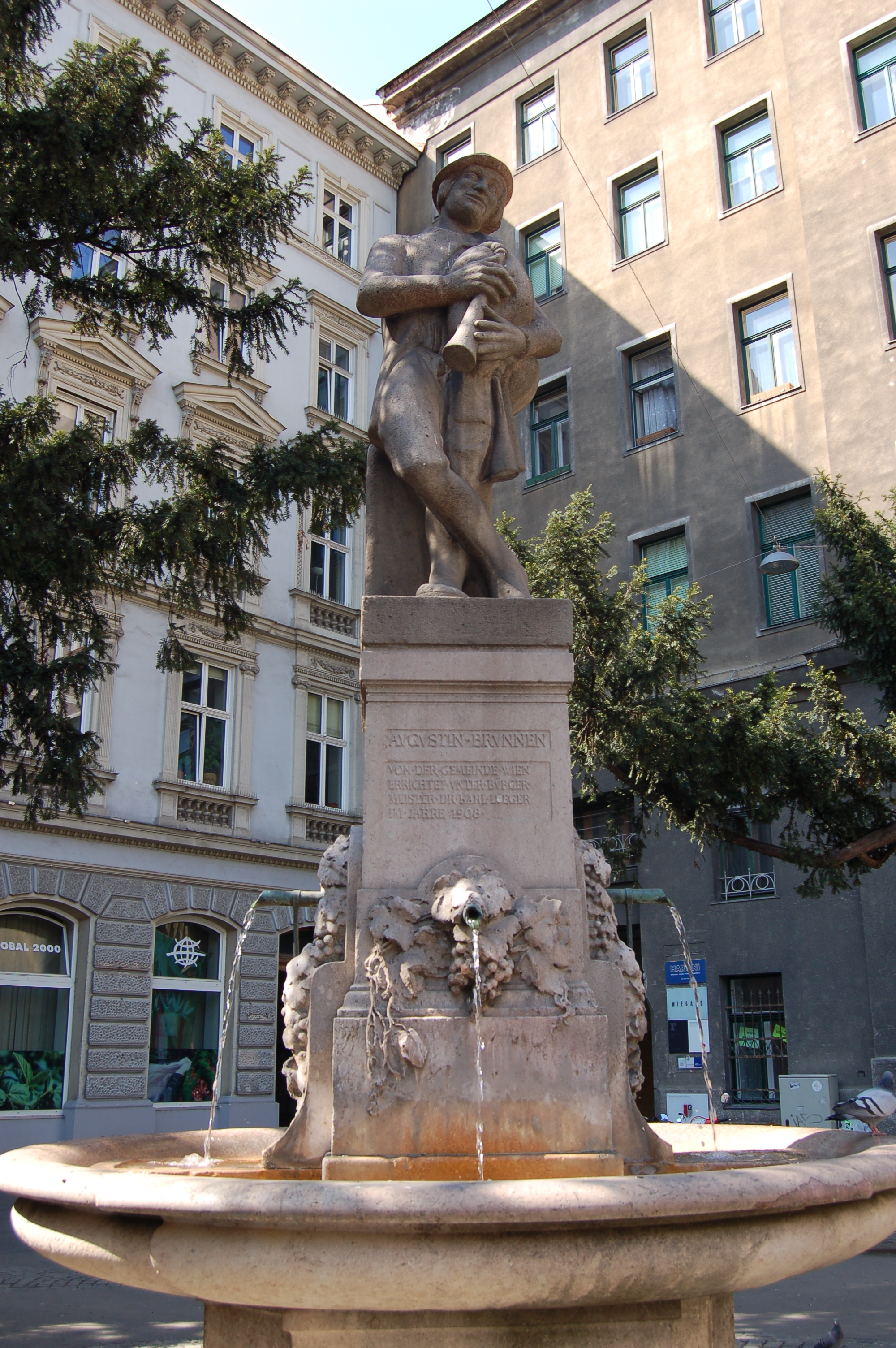 Der Augustinbrunnen in Wien-Neubau.